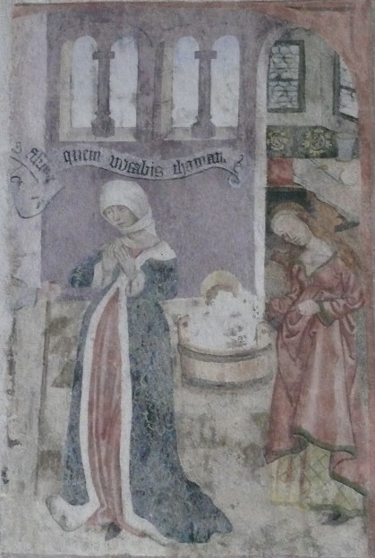 Dominikanerkirche St. Blasius in Regensburg